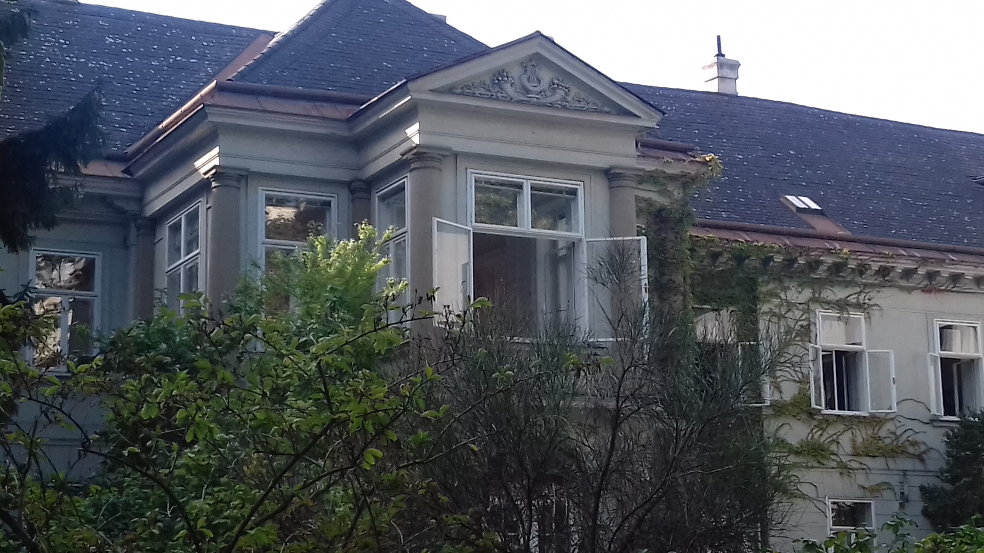 Palais Sternberg (italienisches Kultrinstitut), Gartenseite Diese Datei wurde im Rahmen von WikiDaheim 2018 in Österreich erstellt und hochgeladen.Sie wurde dem allgemeinen Themenbereich zugeordnet.